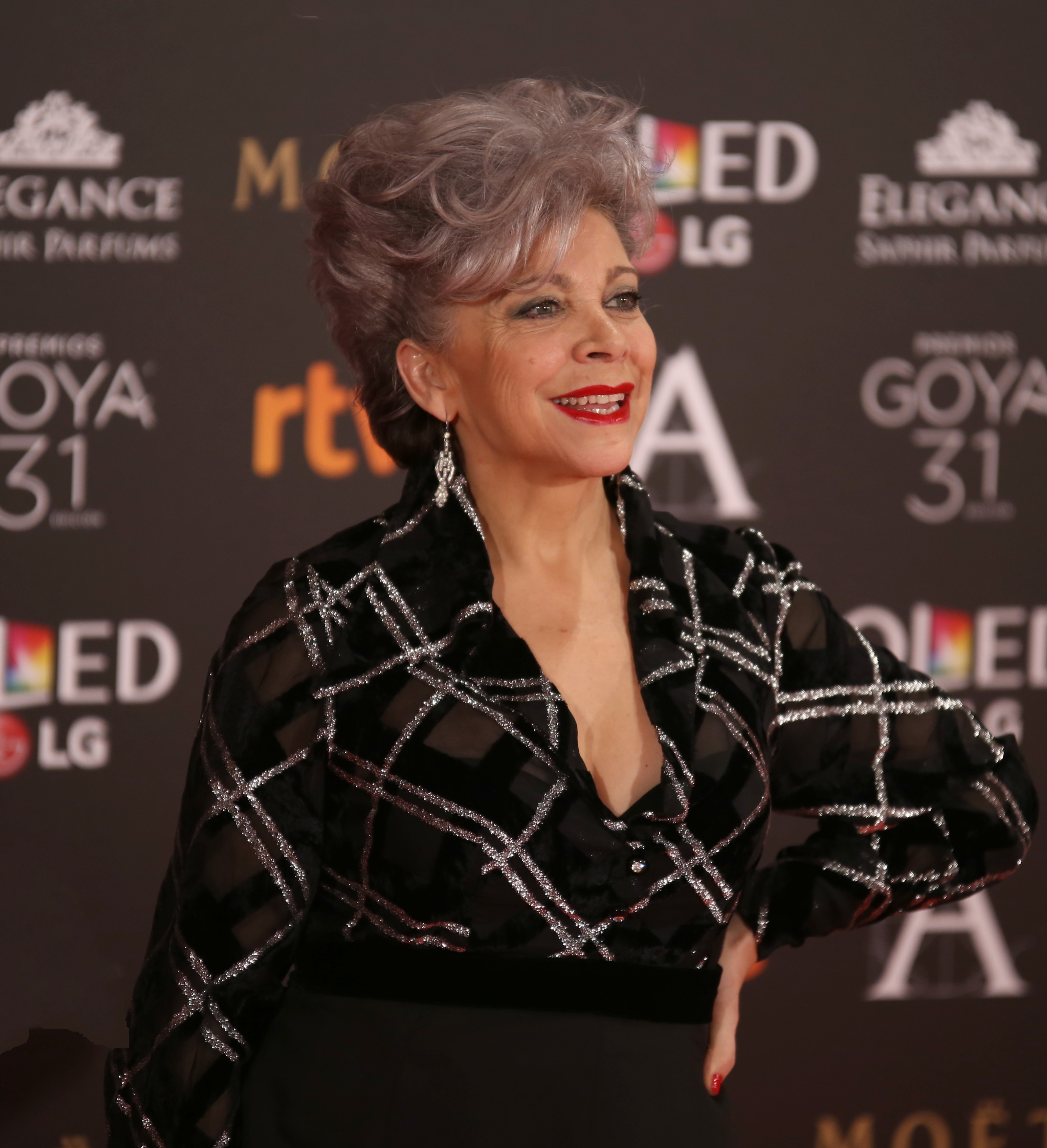 Premios Goya 2017